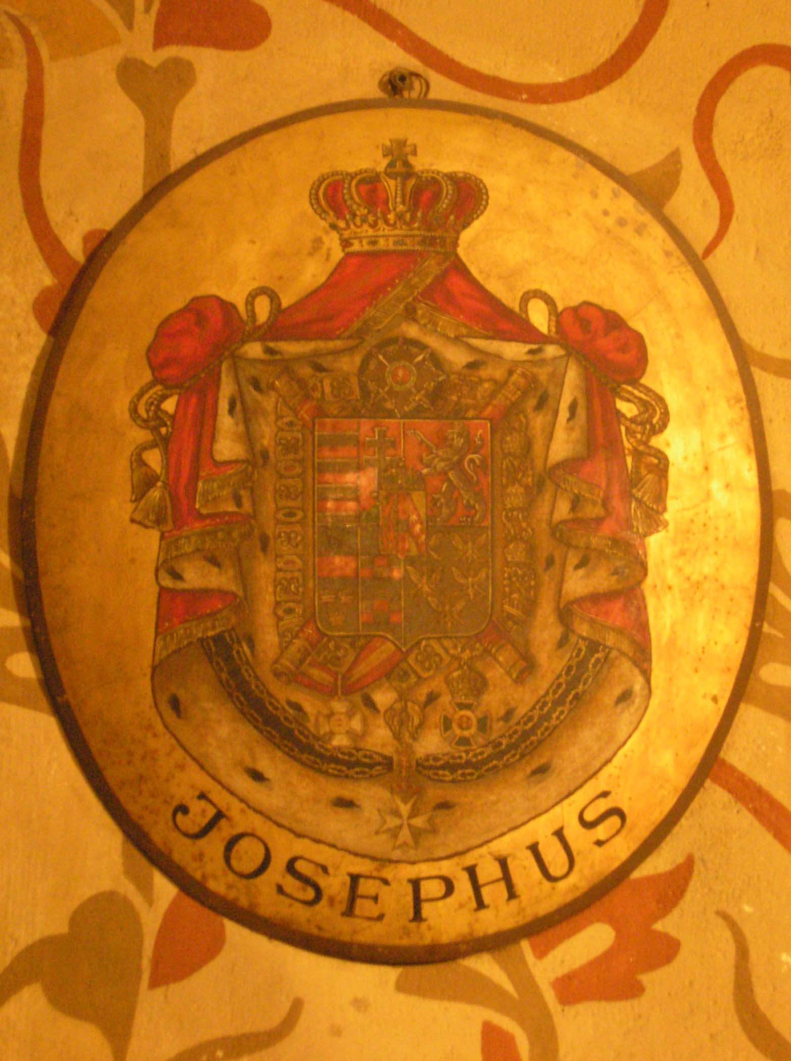 Wappen von Erzherzog Joseph August (1872-1962) inm Malteser Oratorium in der Matthiaskirche, Budapest